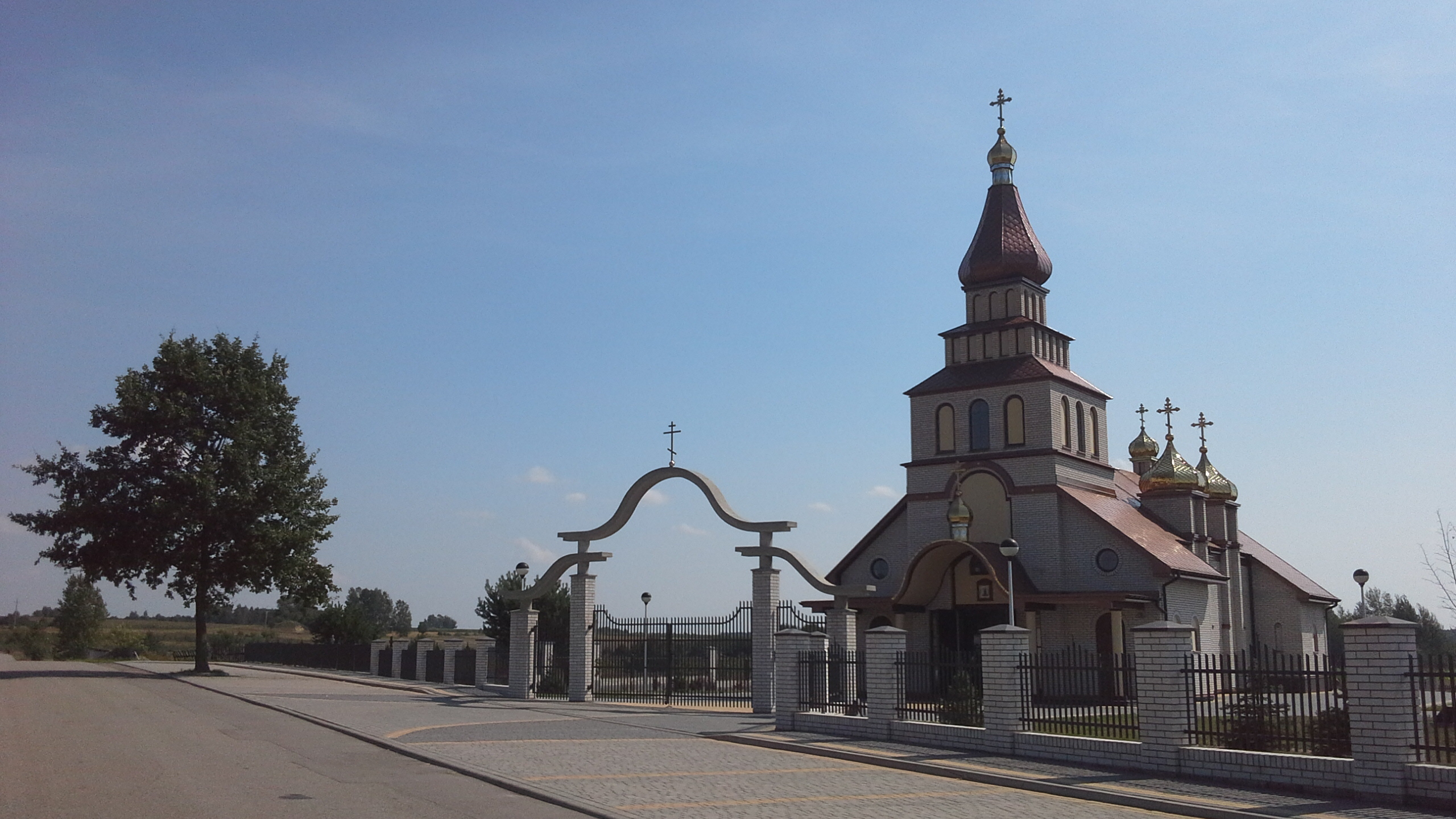 Cerkiew św. Marii Magdaleny w Słochach Annopolskich